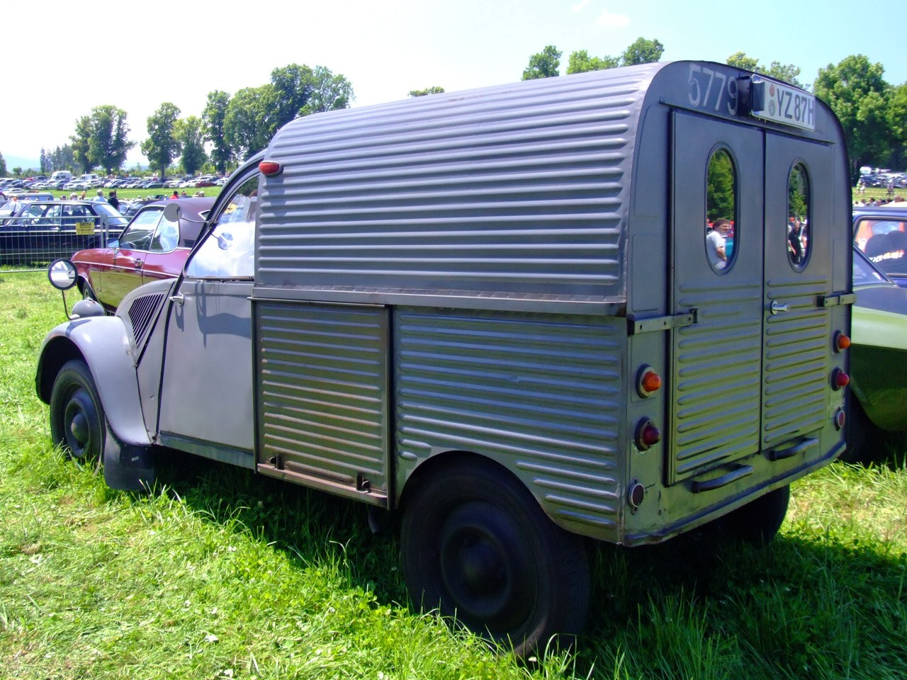 Quelle: selbst fotografiert, 06/2007 Fotograf: Späth Chr.